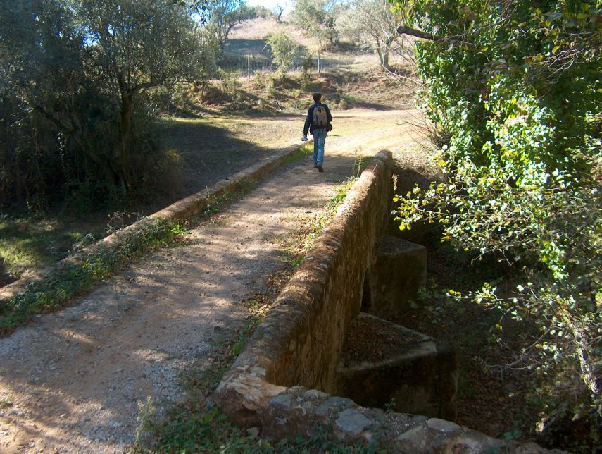 Ponte do Lagar da Boa Fé, Nossa Senhora da Boa Fé, Évora